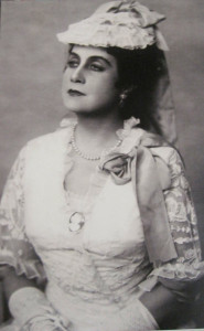 Нина Иосифовна Сластенина в роли Жены Посланника ("Анна Каренина")